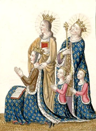 Joanna of Armagnac et fills